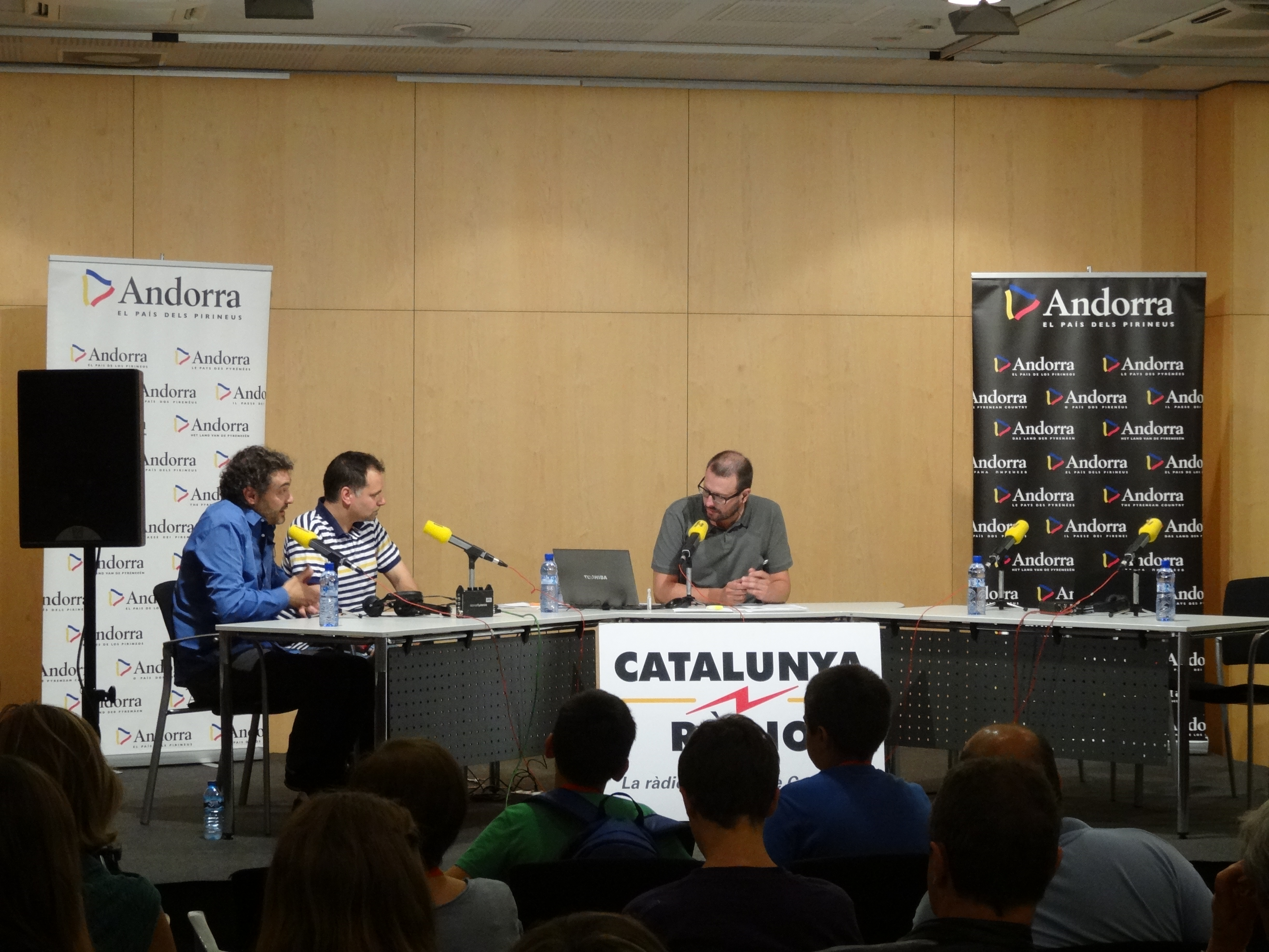 Programa El Matí de Catalunya Ràdio - centre de congressos d'Andorra